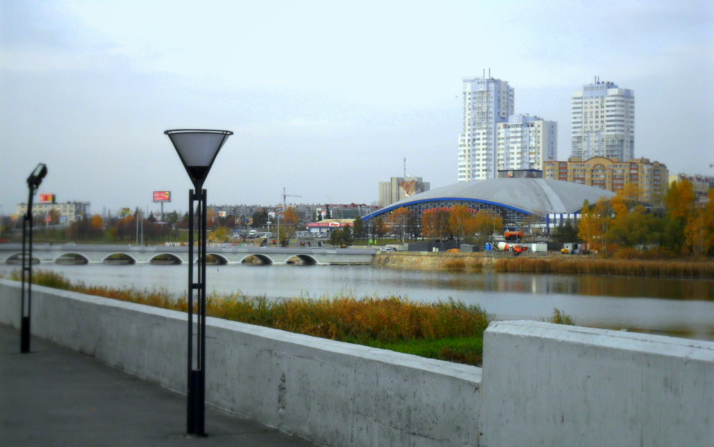 Вид Челябинска